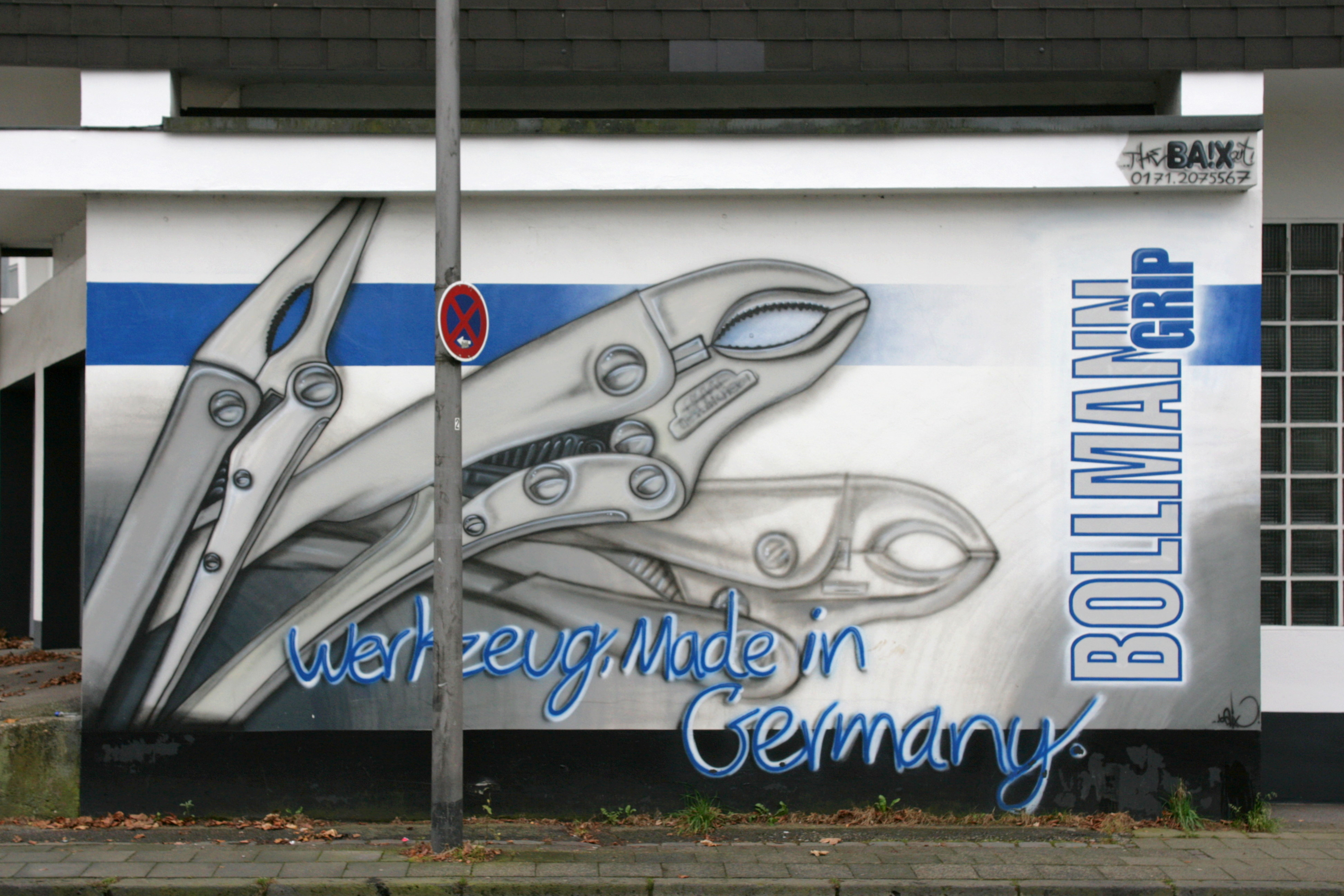 Wandbild von René Schneider für die Bollmann GmbH an der Kreuzbergstraße in Remscheid